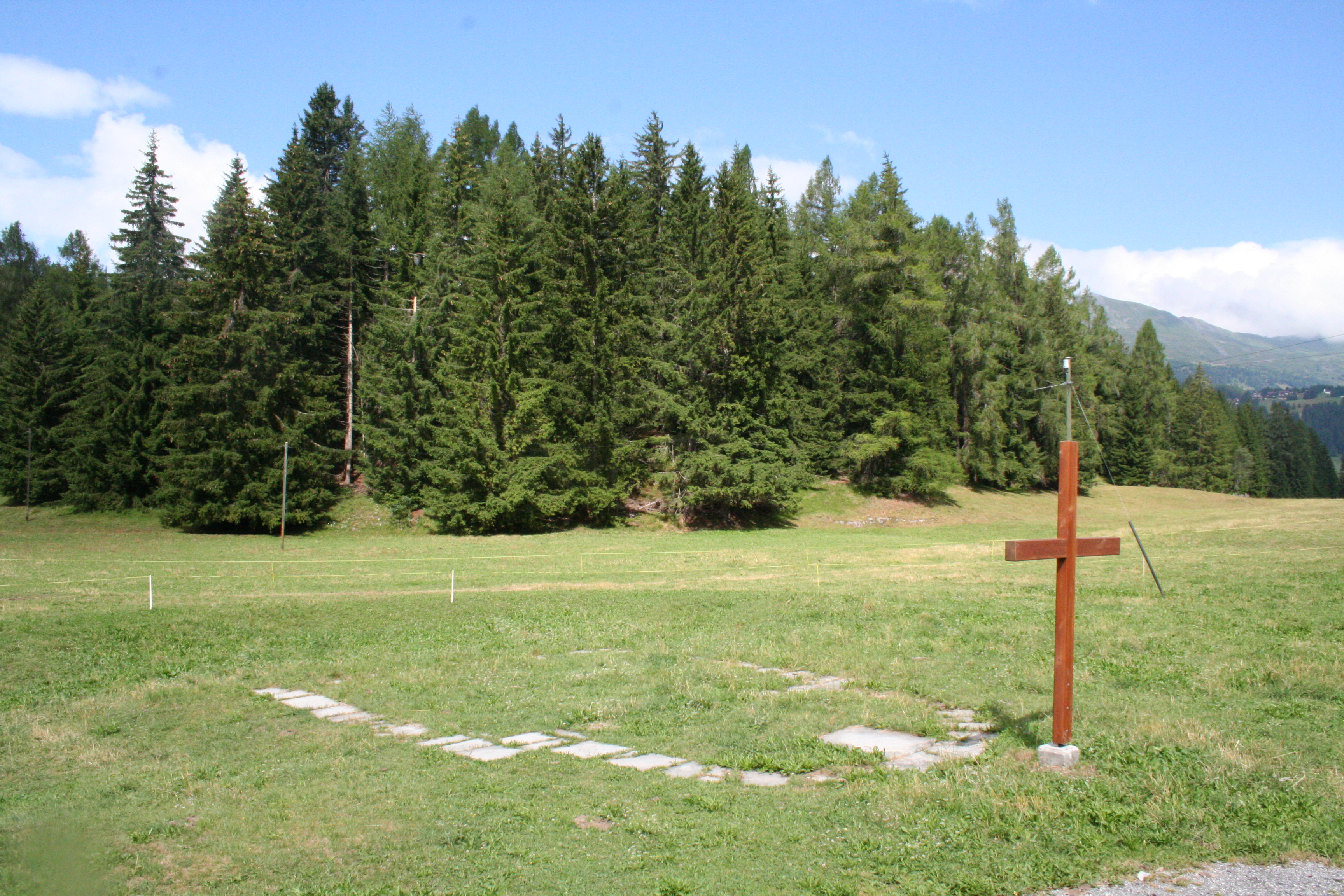 Kapelle St. Cassian Lantsch/Lenz alte Kirche